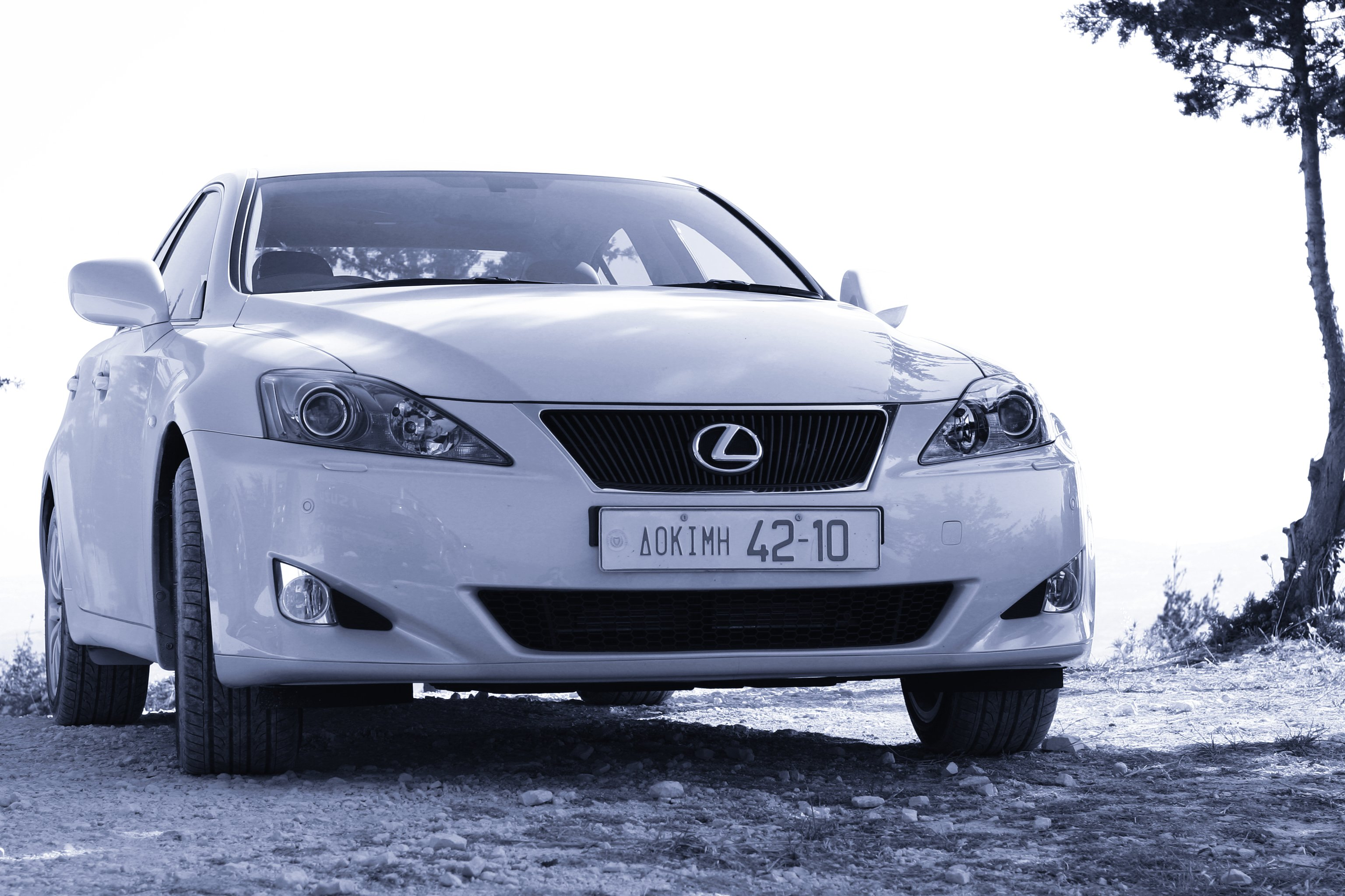 Lexus IS220d